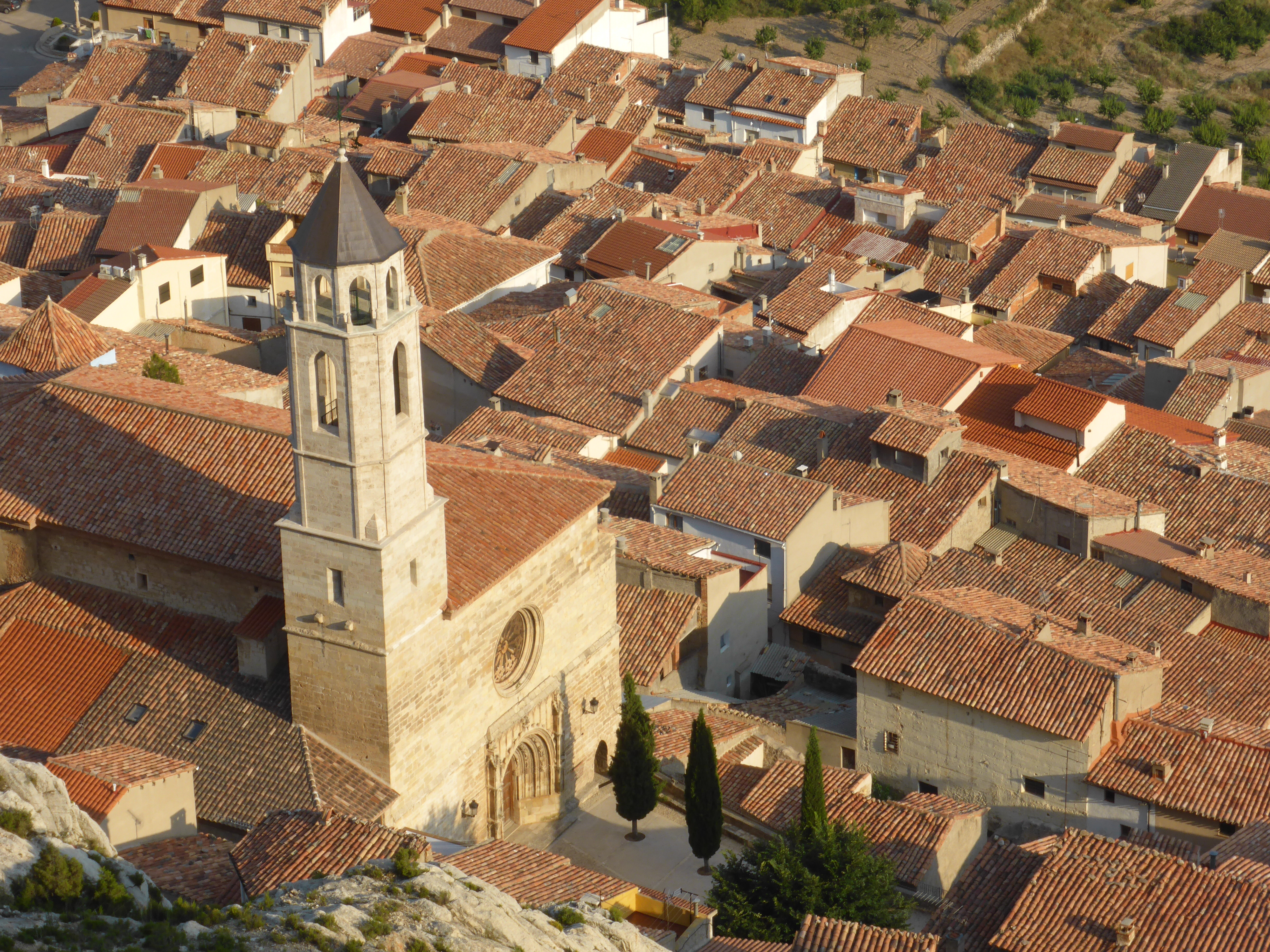 En el pueblo de Castellote (Teruel, Aragón, España), la iglesia de San Miguel fue muy dañada en la Guerra Civil. En el año 2017 se ha inaugurado la reconstrucción del torreón de San Miguel. La iglesia estaba sin la torre desde la guerra.